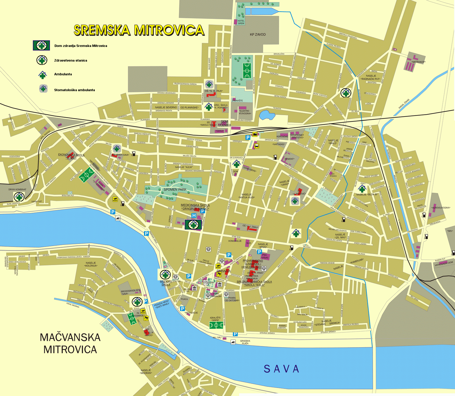 Слика приказује локације објеката Дома здравља Сремска Митровица у граду.